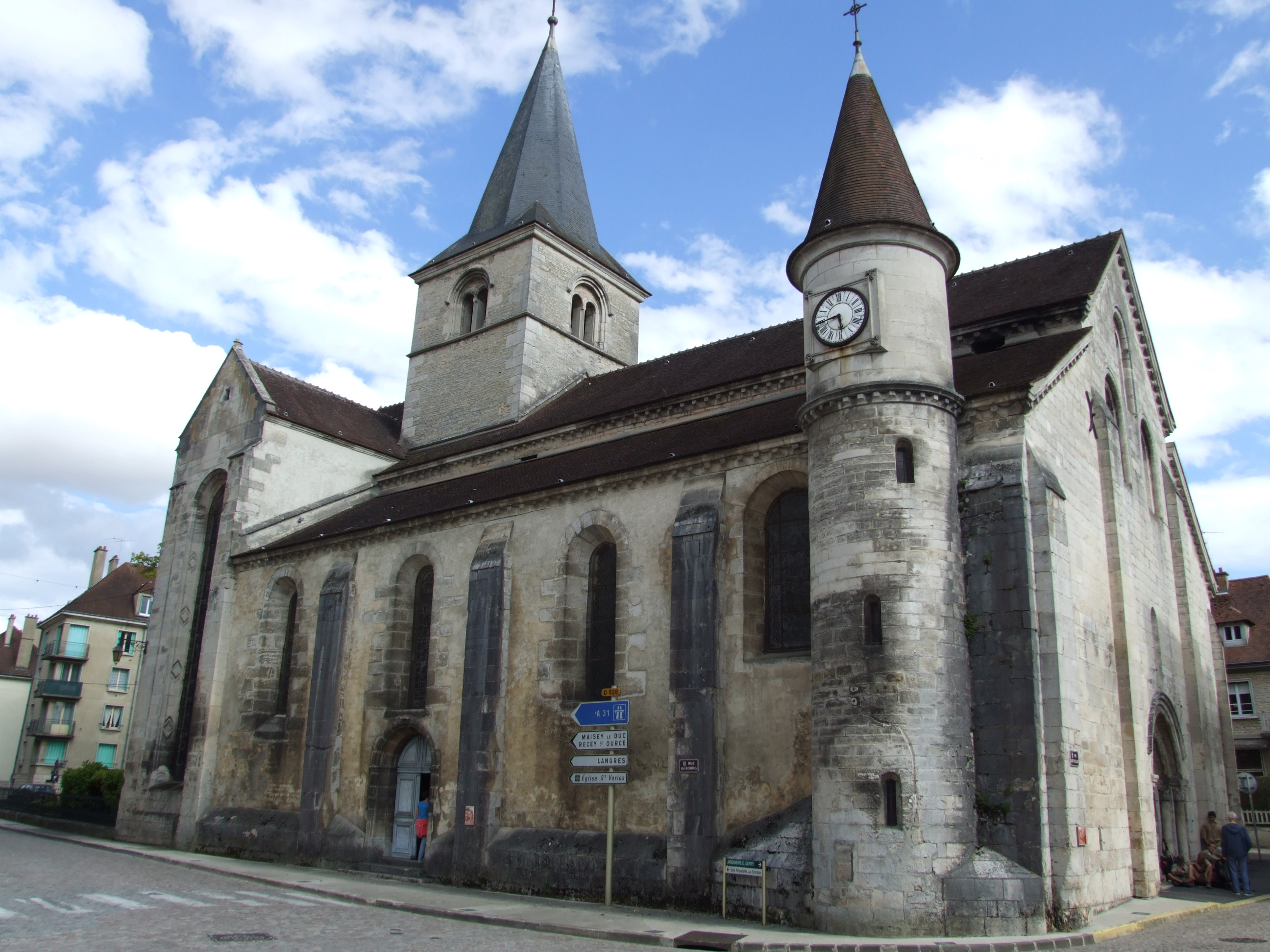 Église Saint-Nicolas de Châtillon-sur-Seine, Côte-d'Or, Bourgogne, FRANCE